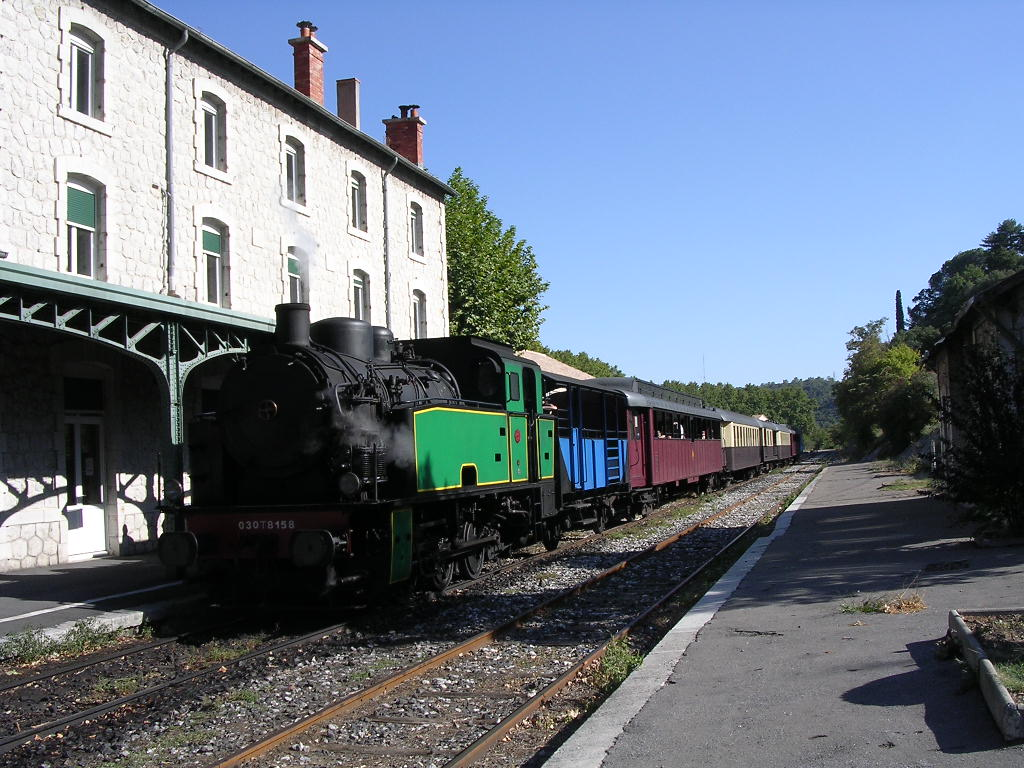 Chemin de fer Anduze - Saint-Jean-du-Gard (Anduze, France)